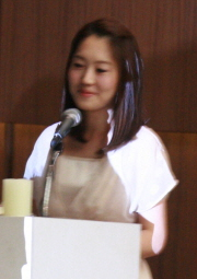 결혼해주세요 제작발표회